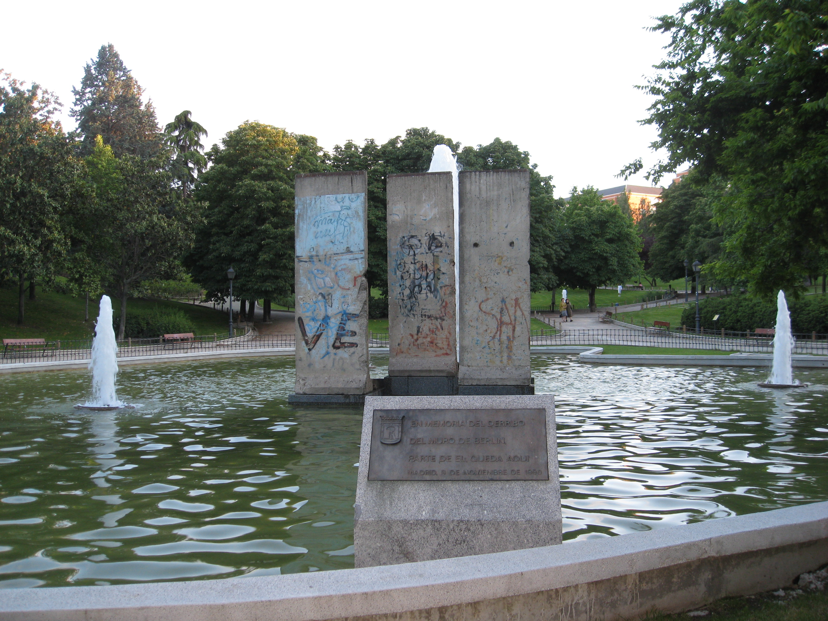 Trozo del muro de Berlín en el Parque de Berlín